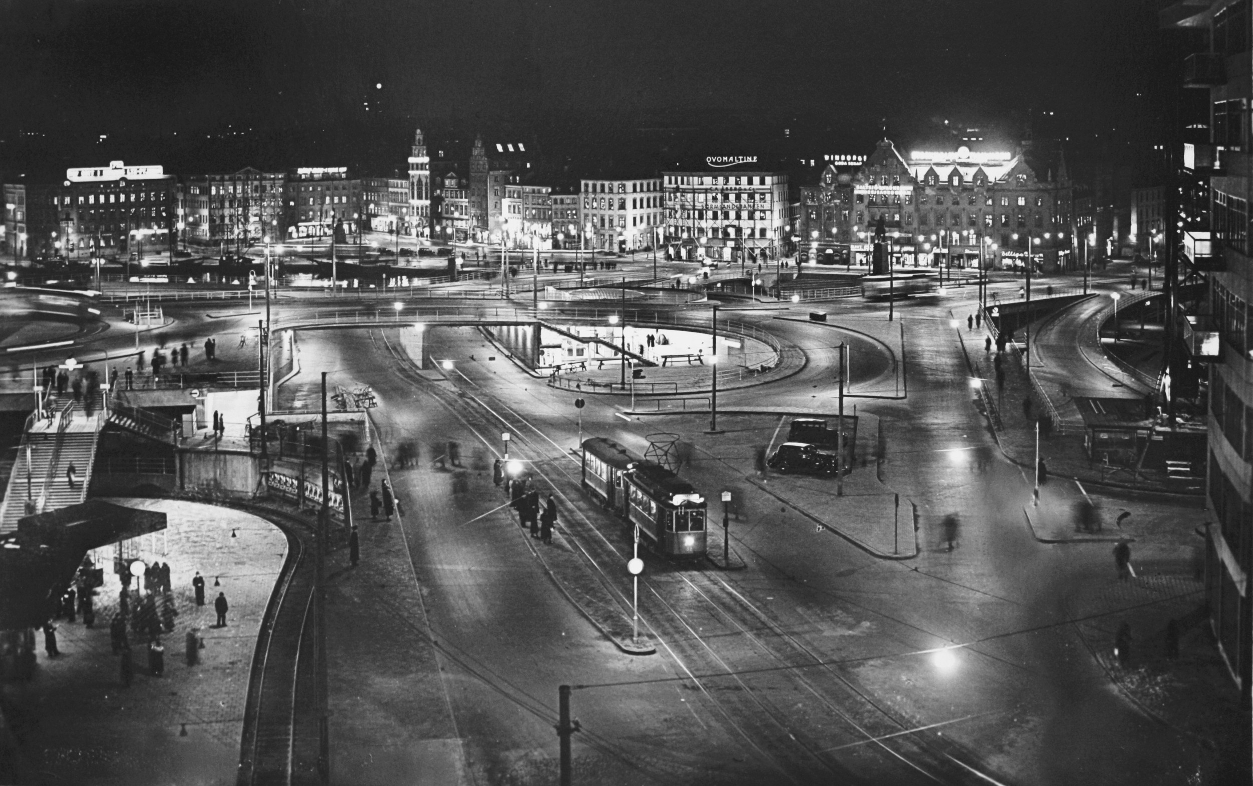 Slussen på 1940-talet, vy mot norr och Gamla stan